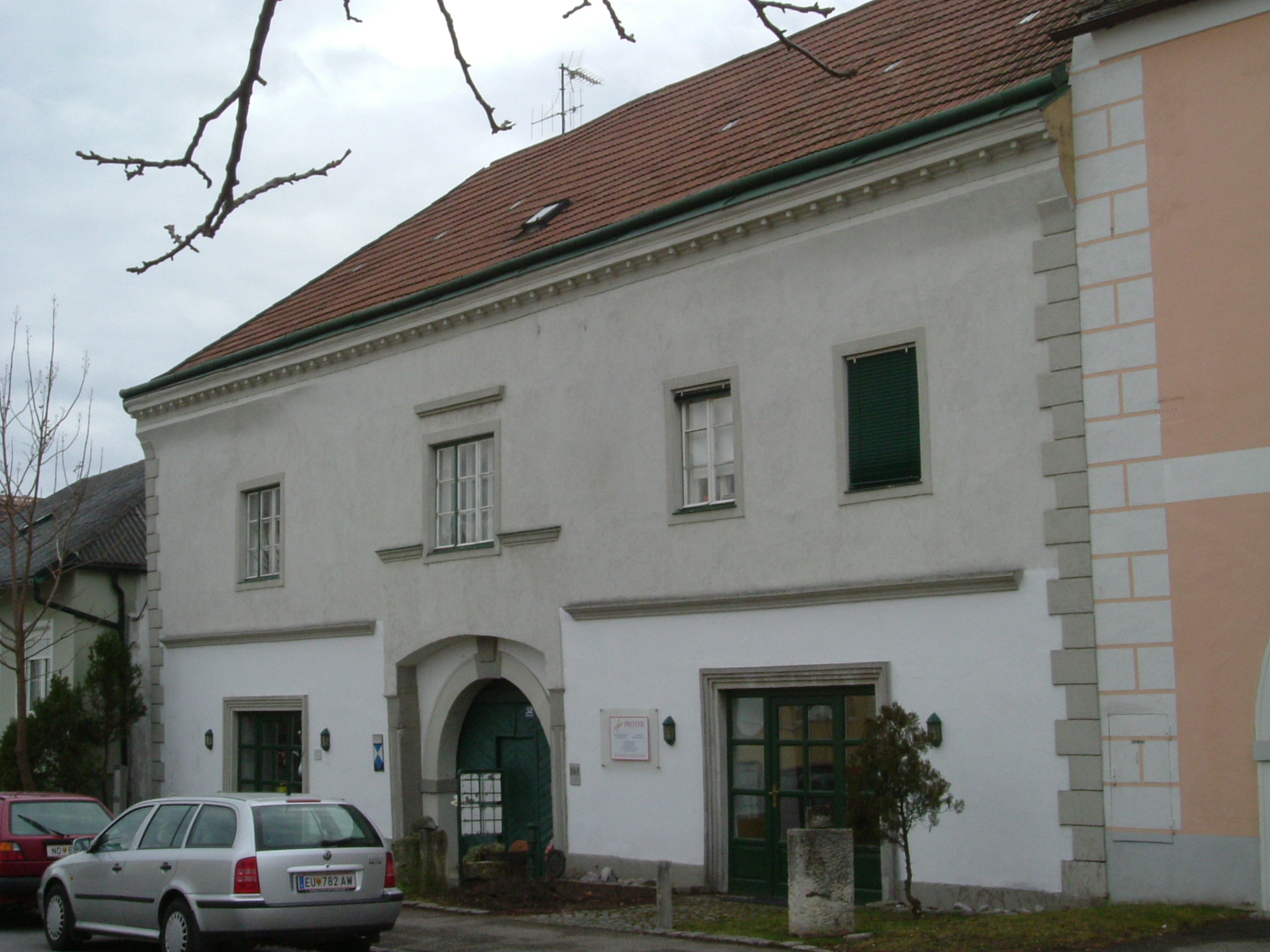 Breitenbrunn, Austria - Burgenland